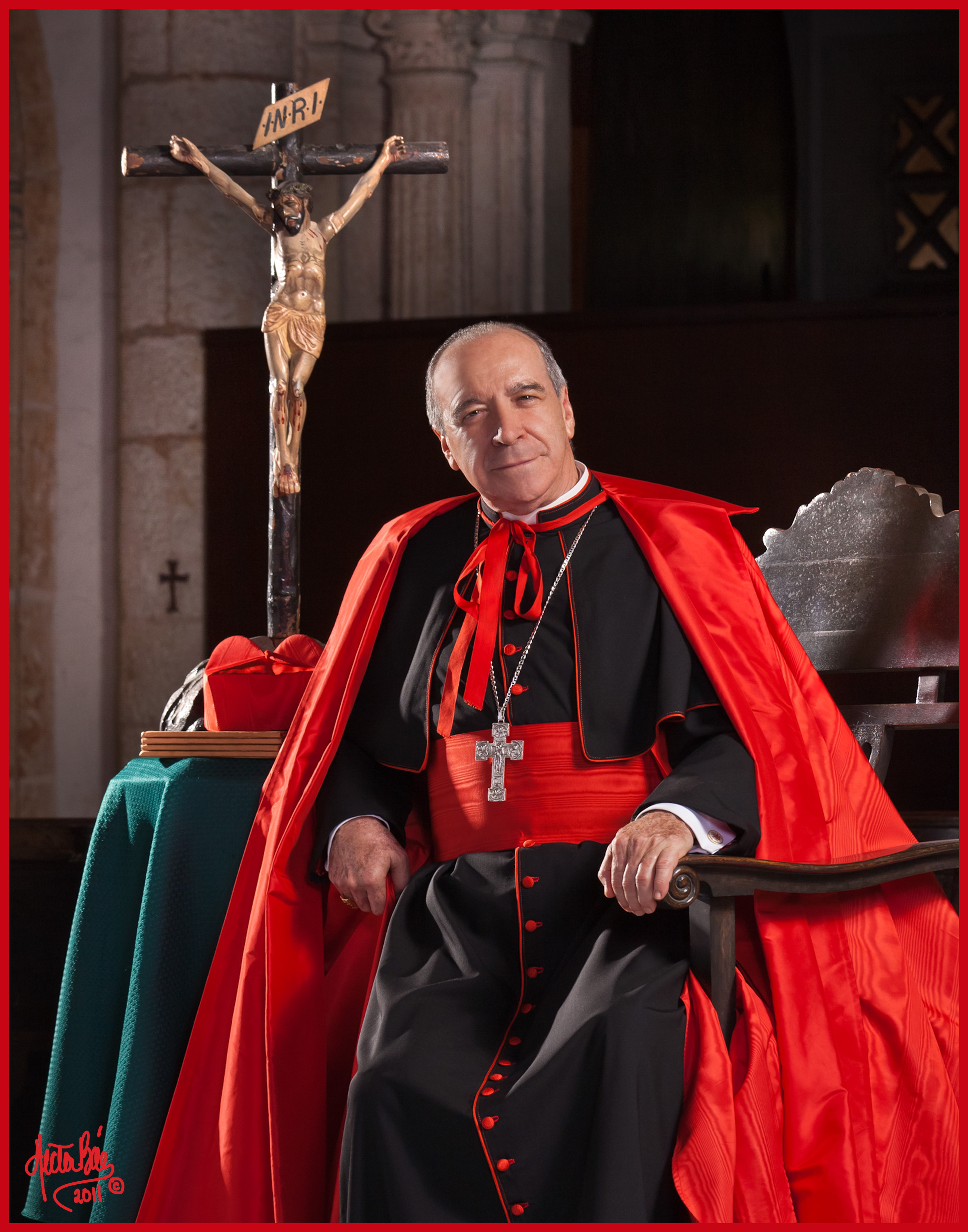 Imagen del Cardenal Nicolás de Jesús López Rodríguez tomada por el fotógrafo Héctor Báez.